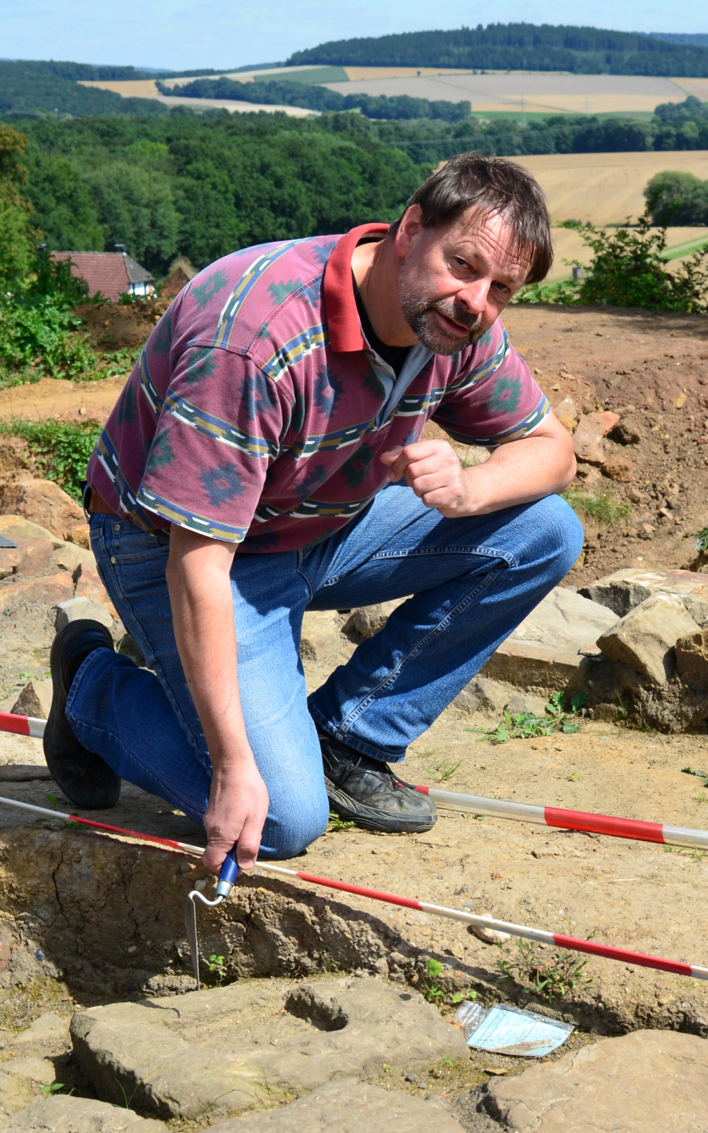 Peter Steppuhn auf der Ausgrabung der Glashütte Klein Süntel, im Boden vermutlich ein Fundamentstein zur Aufnahme eines Holzstempels für das Arbeitspodest der Glasbläser